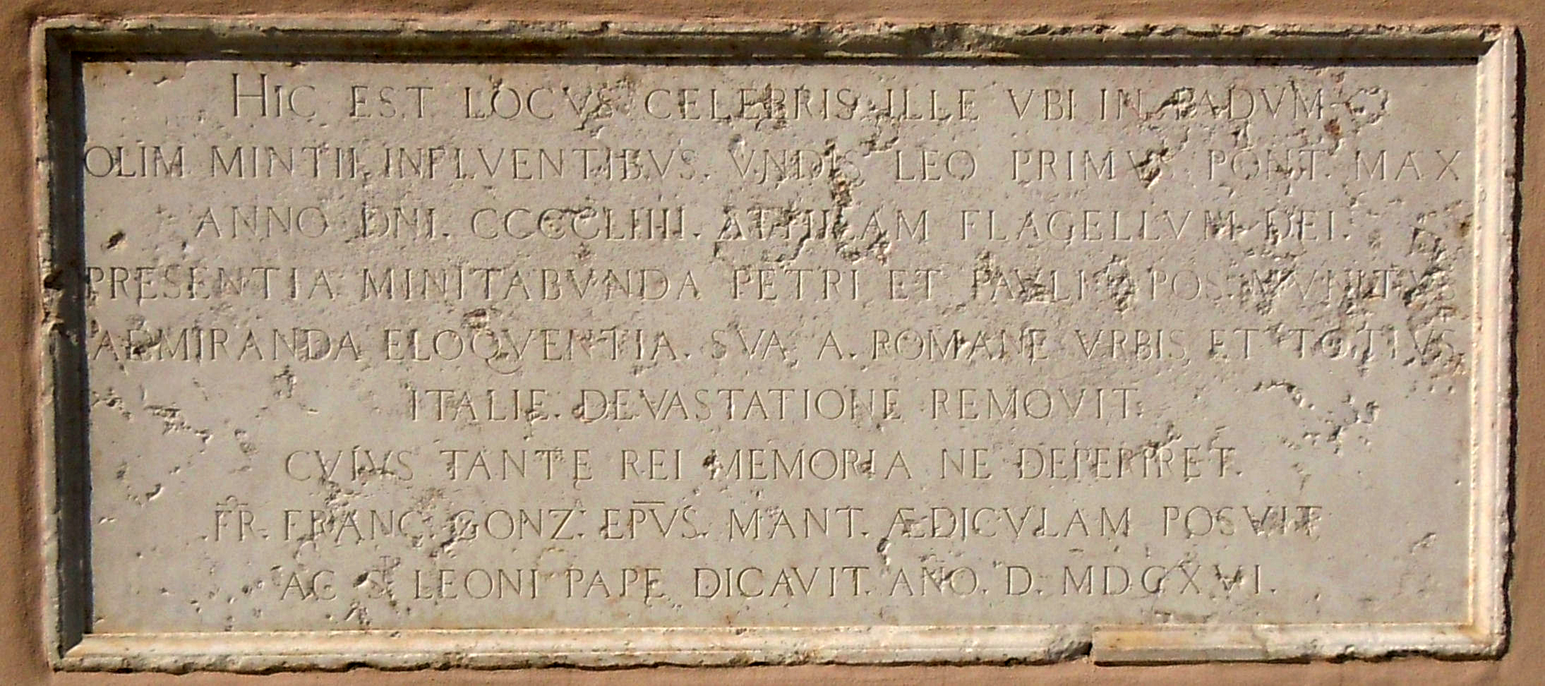 Governo, lapide Papa Leone I.